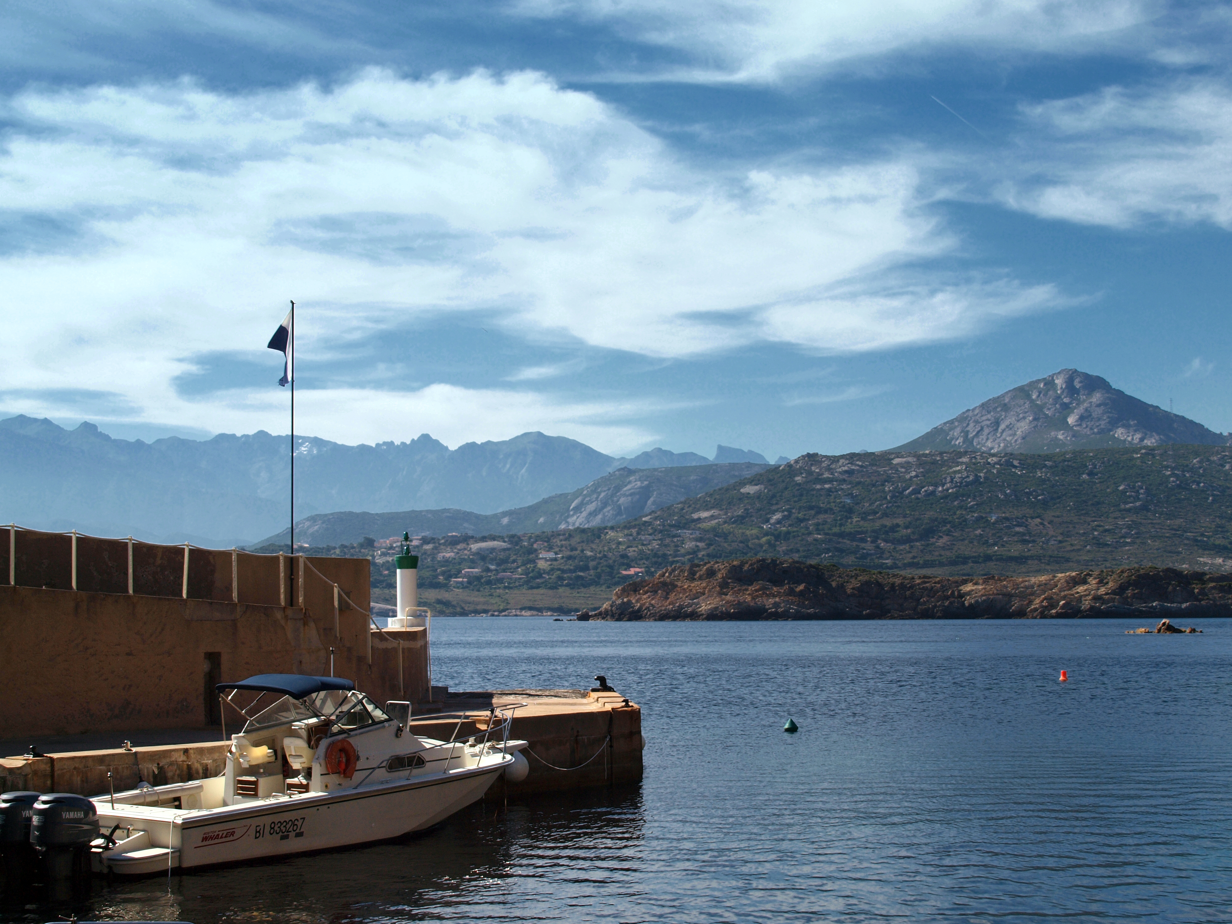 Calvi (Corse) - Jetée de la STARESO et la punta di l'Oscelluccia. Tout au fond, le Monte cinto et la caractéristique Paglia Orba